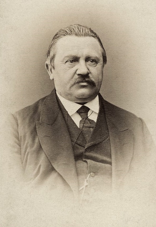 Karl von Alwens (1820-1889), Bayerischer Landtagsabgeordneter, geb. in Frankenthal